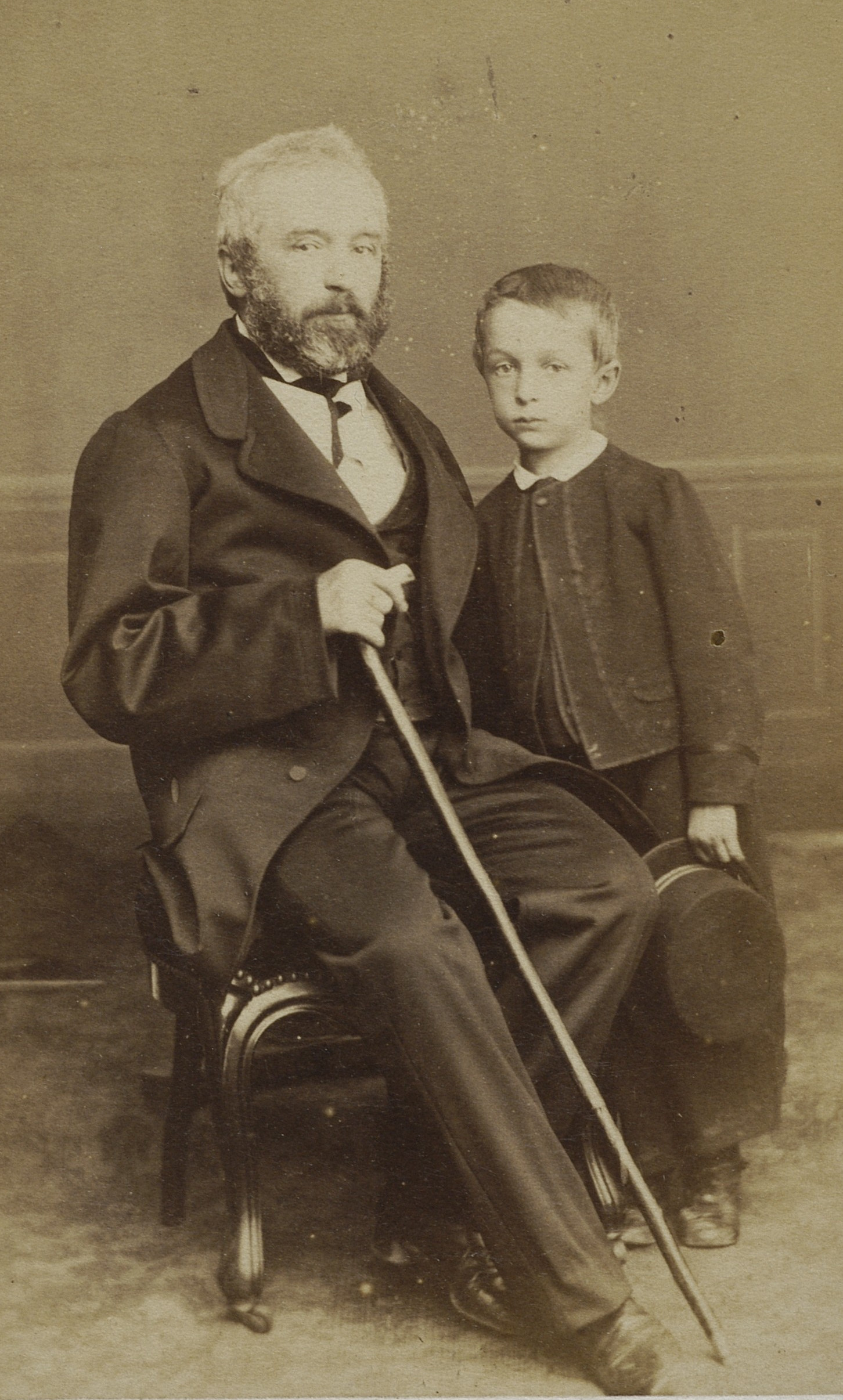 Julian F. Horain z synem Tadeuszem